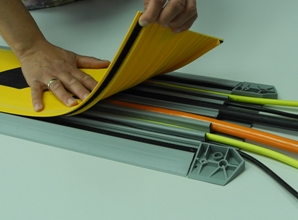 Kabelkanal von oben zu belegen